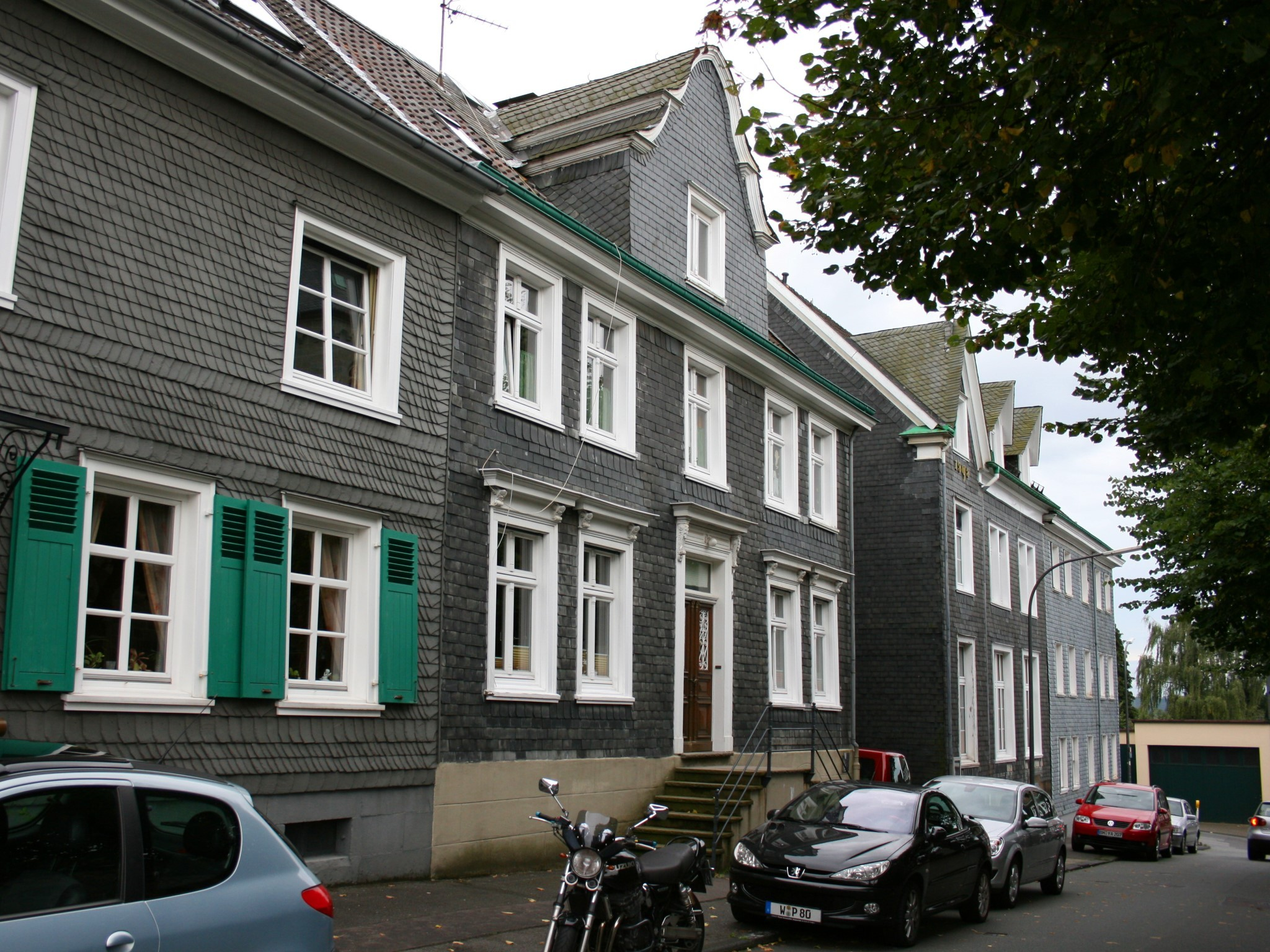 Wuppertal-Ronsdorf: Reformiertes Pfarrhaus